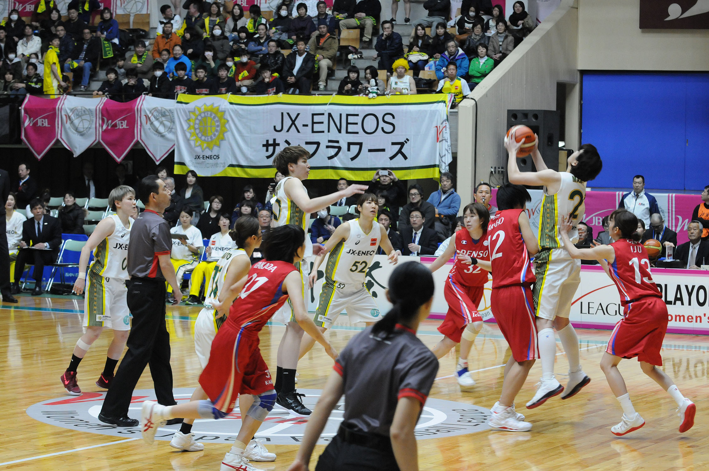 WJBL 16-17プレーオフセミファイナル、デンソー対JX-ENEOS。秋田県立体育館。